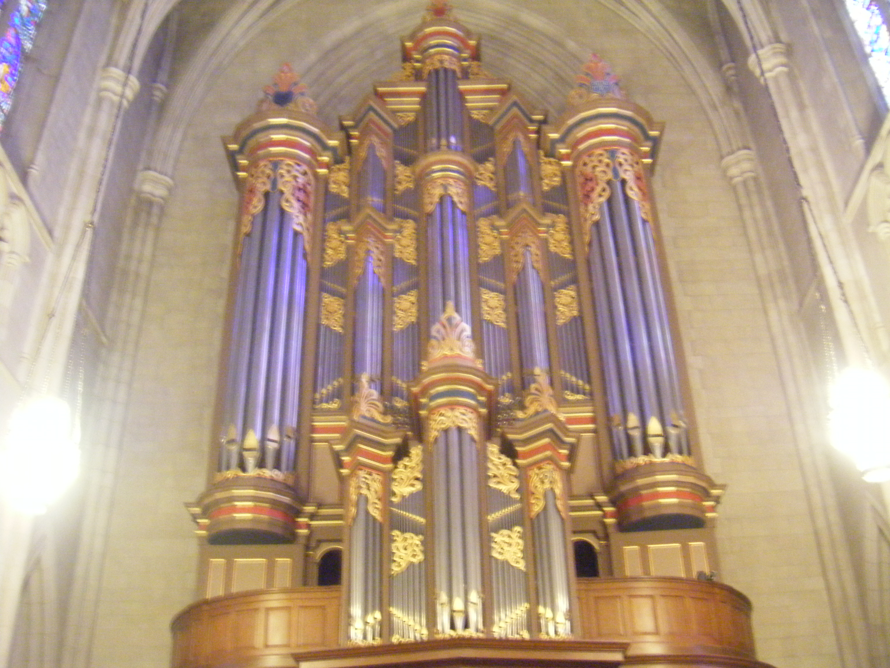 Organ in Duke Chapel